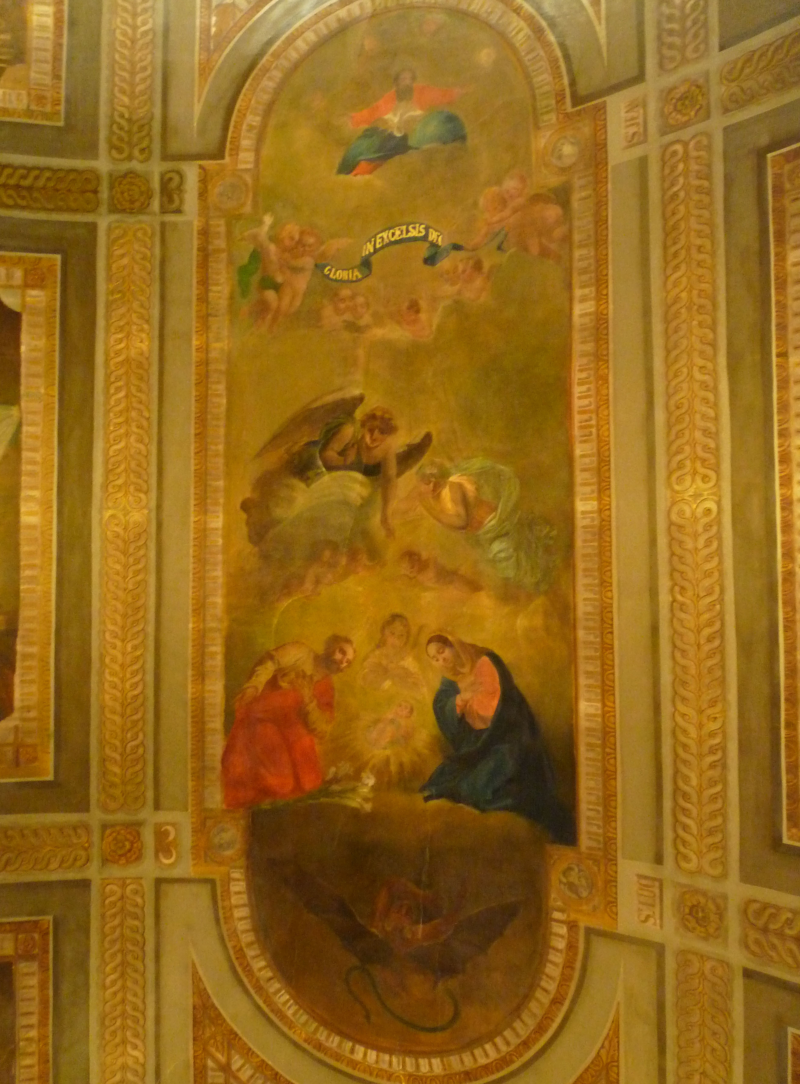 Chapelle Ménissier à Wassy (Haute-Marne). Ancien couvent des Dames de Saint-Maur. Décor du plafond peint par Joseph-Constant Ménissier vers 1840 (scènes de la vie du Christ)